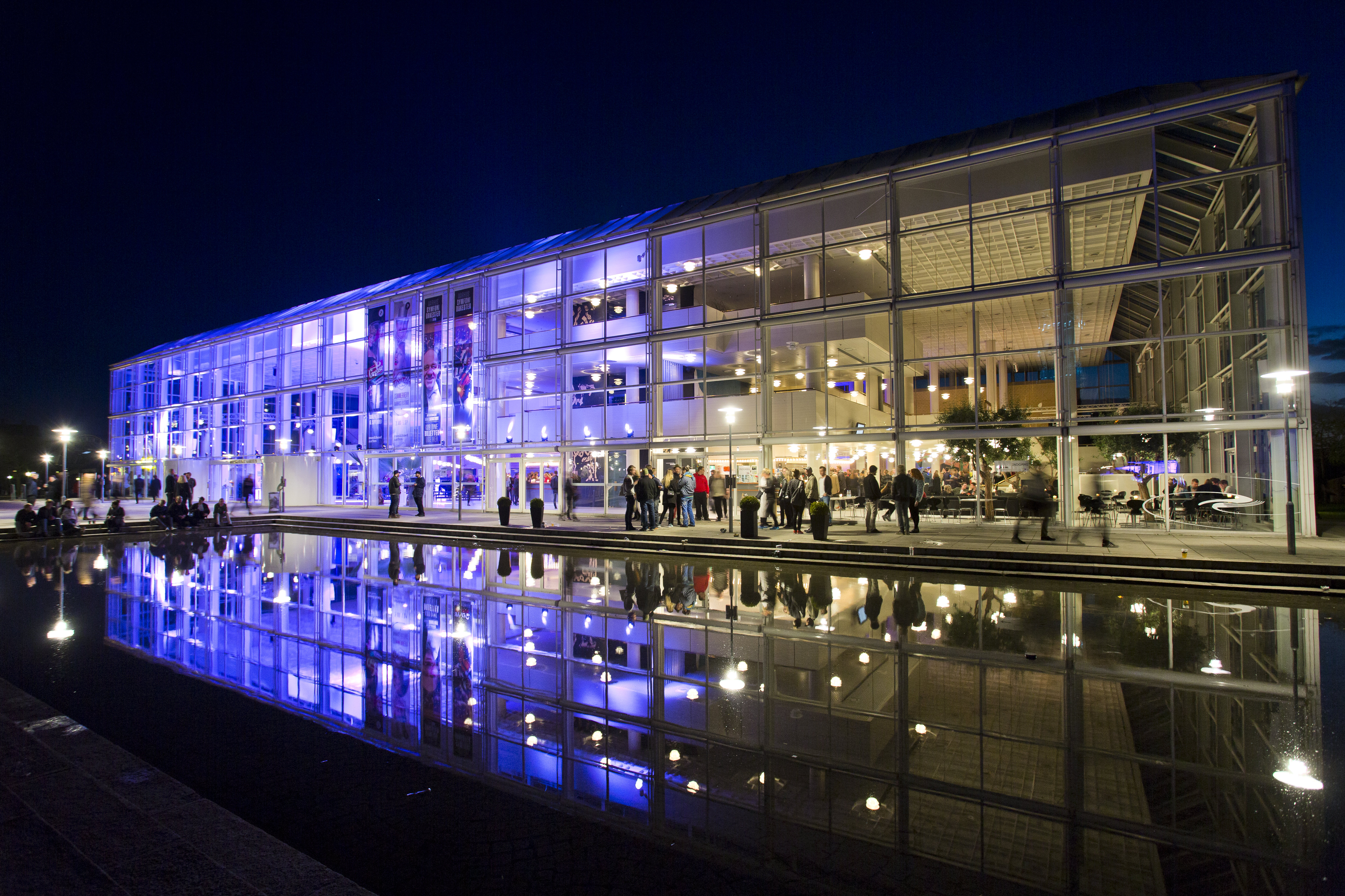 Motiv: Musikhuset Aarhus Fotograf: Jonas Høholt